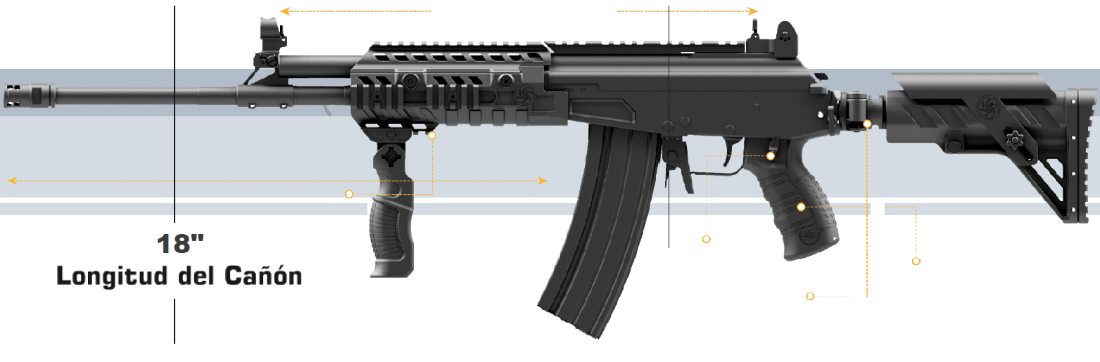 Indumil: Industria Militar de Colombia